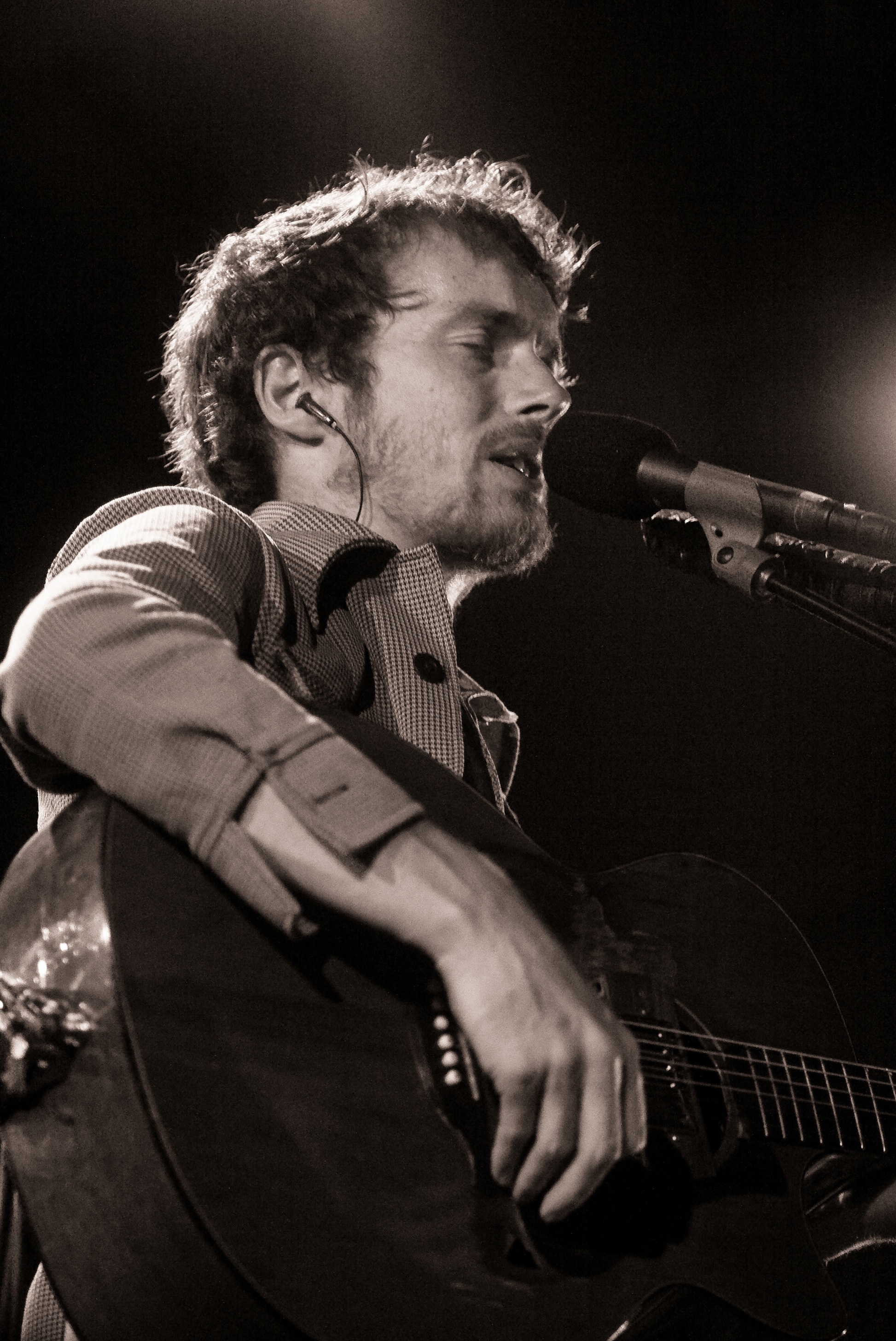 Damien Rice performing in Villa Arconati, near Milan.